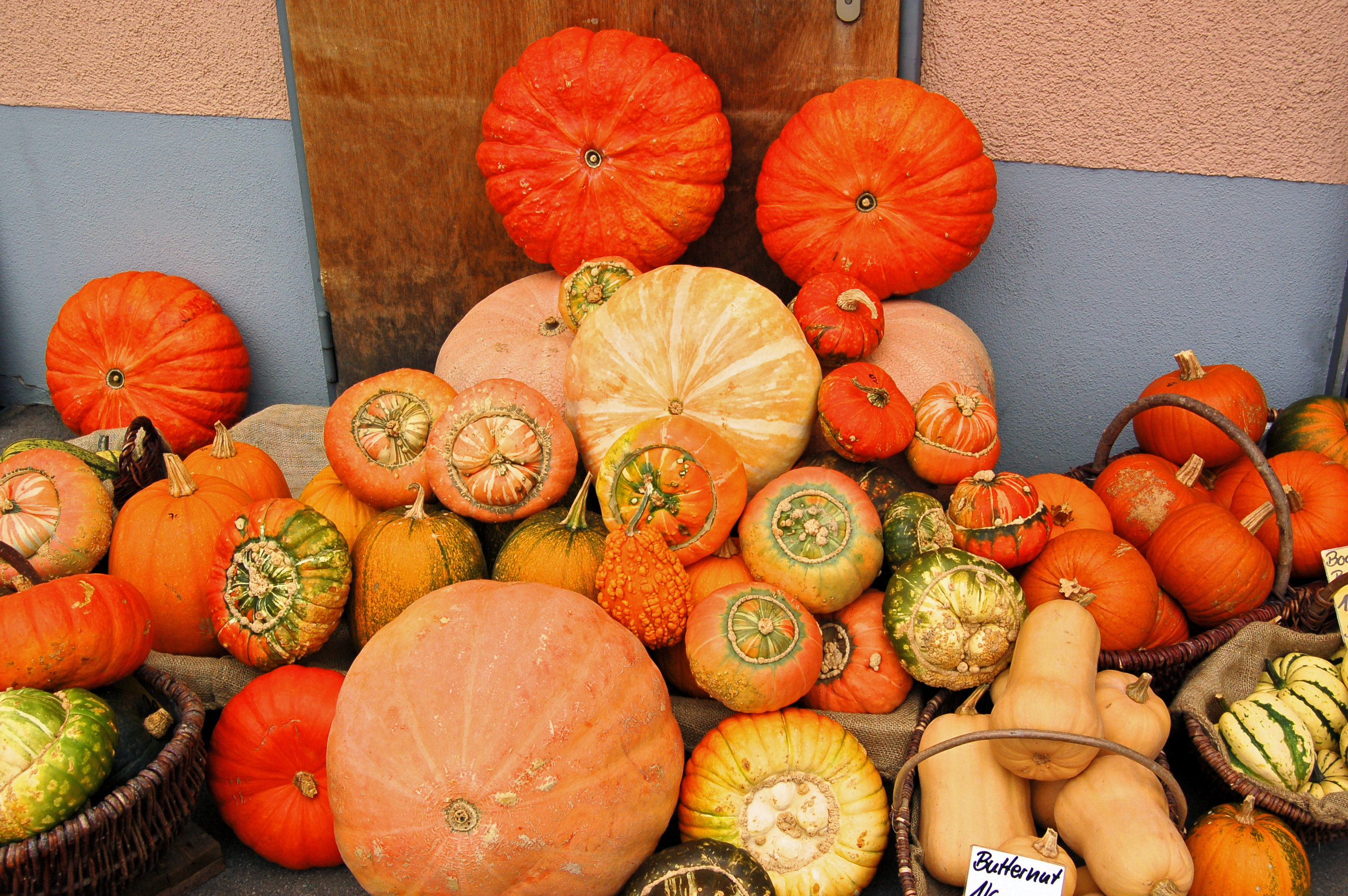 Unterwegs in dem kleinen Weinort Hagnau am Bodensee. Hier zwischen Meersburg und Hagnau wächst alles, was beim Bodensee-Wein Rang und Namen hat. - Überall im Ort fand man liebevoll hergerichtete Schmuckstücke zum Erntedankfest.